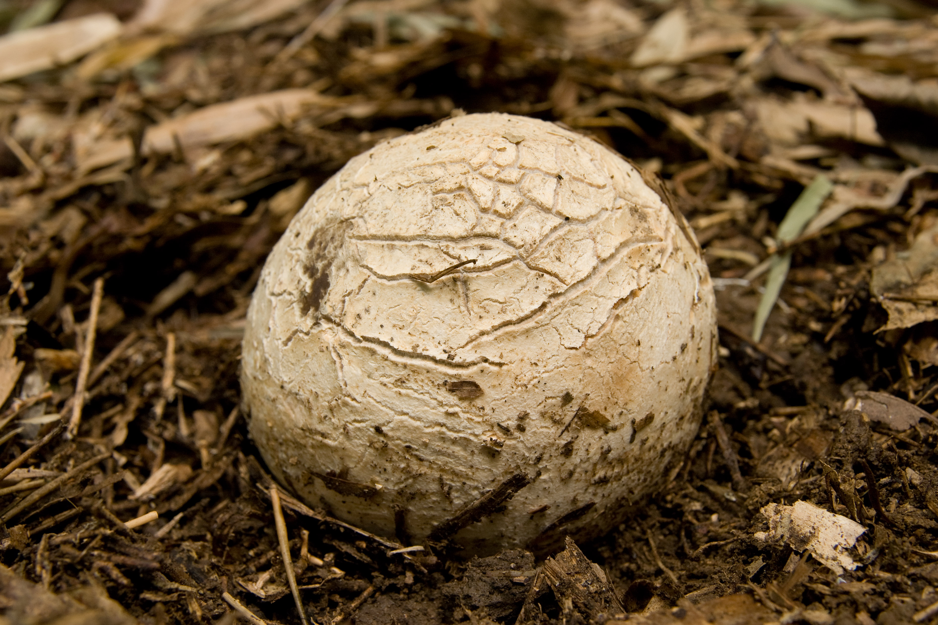 オニフスベ (学名:Calvatia nipponica)